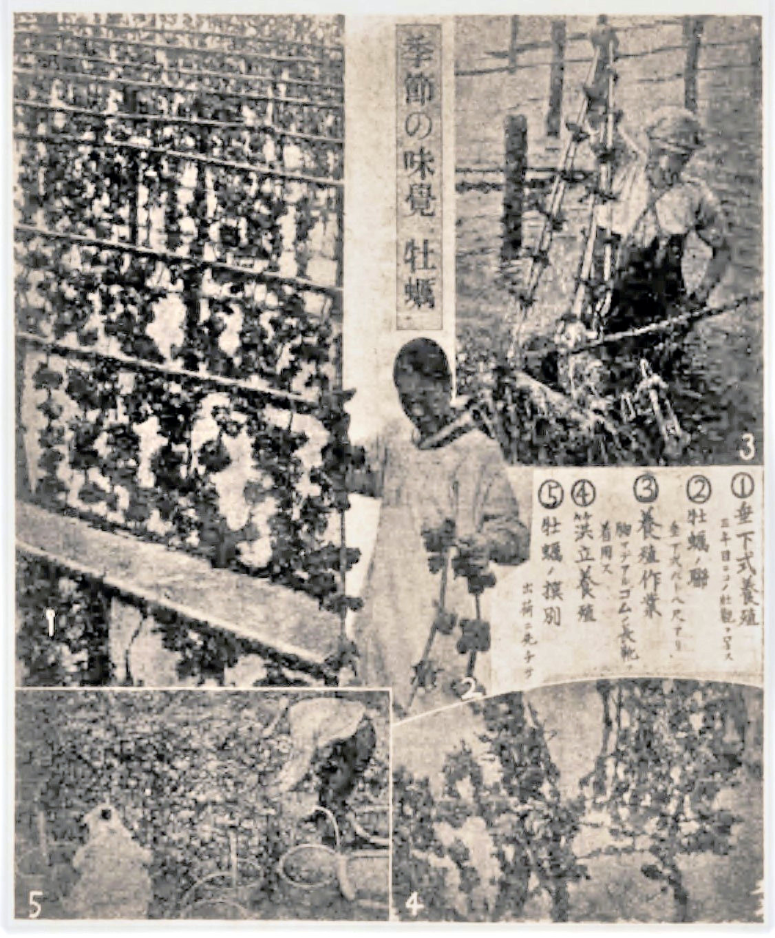 季節の味覚 牡蠣